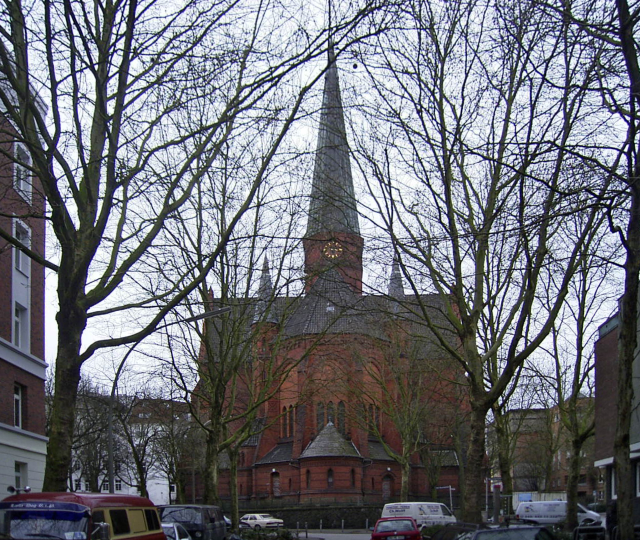 Die neogotische evangelisch-lutherische Friedenskirche in der Otzenstraße in St. Pauli wurde 1893 bis 1895 von Johannes Otzen im Stile der Hannoverschen Schule erbaut. Zur Bauzeit gehörte das Gebiet noch zu Altona. This is a photograph of an architectural monument.